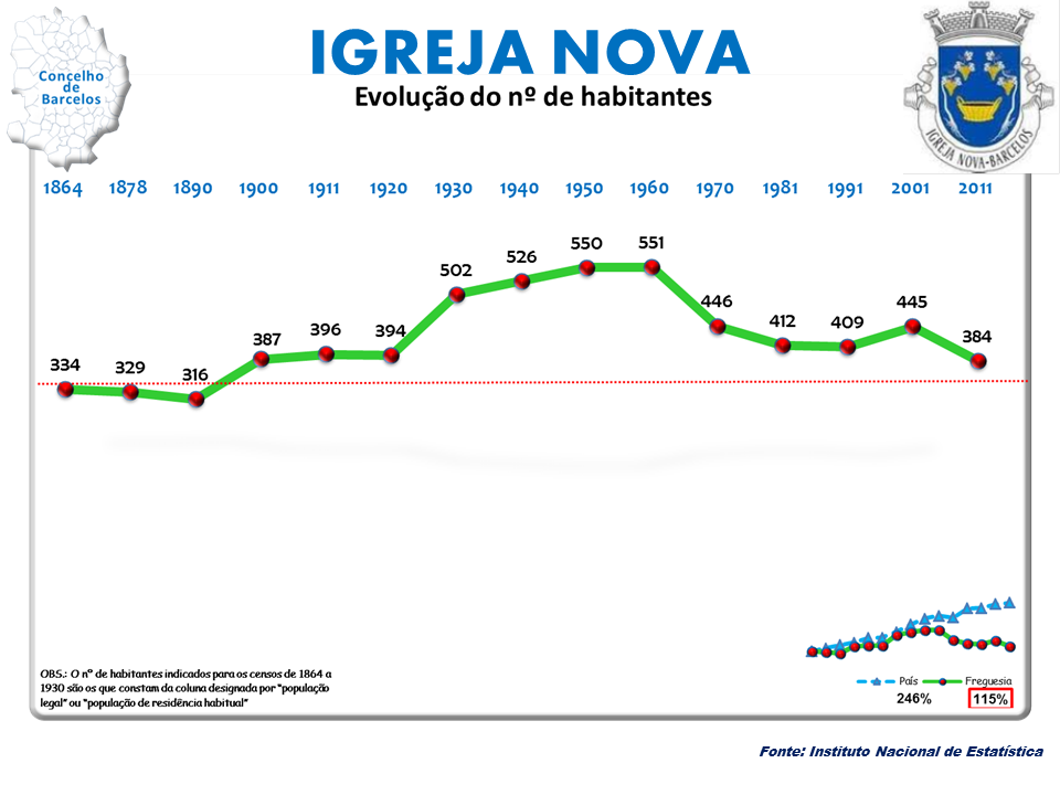 Censos 1964/2011